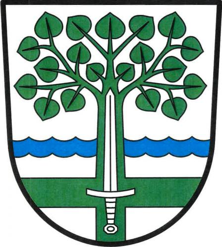 Libkova Voda, znak obce